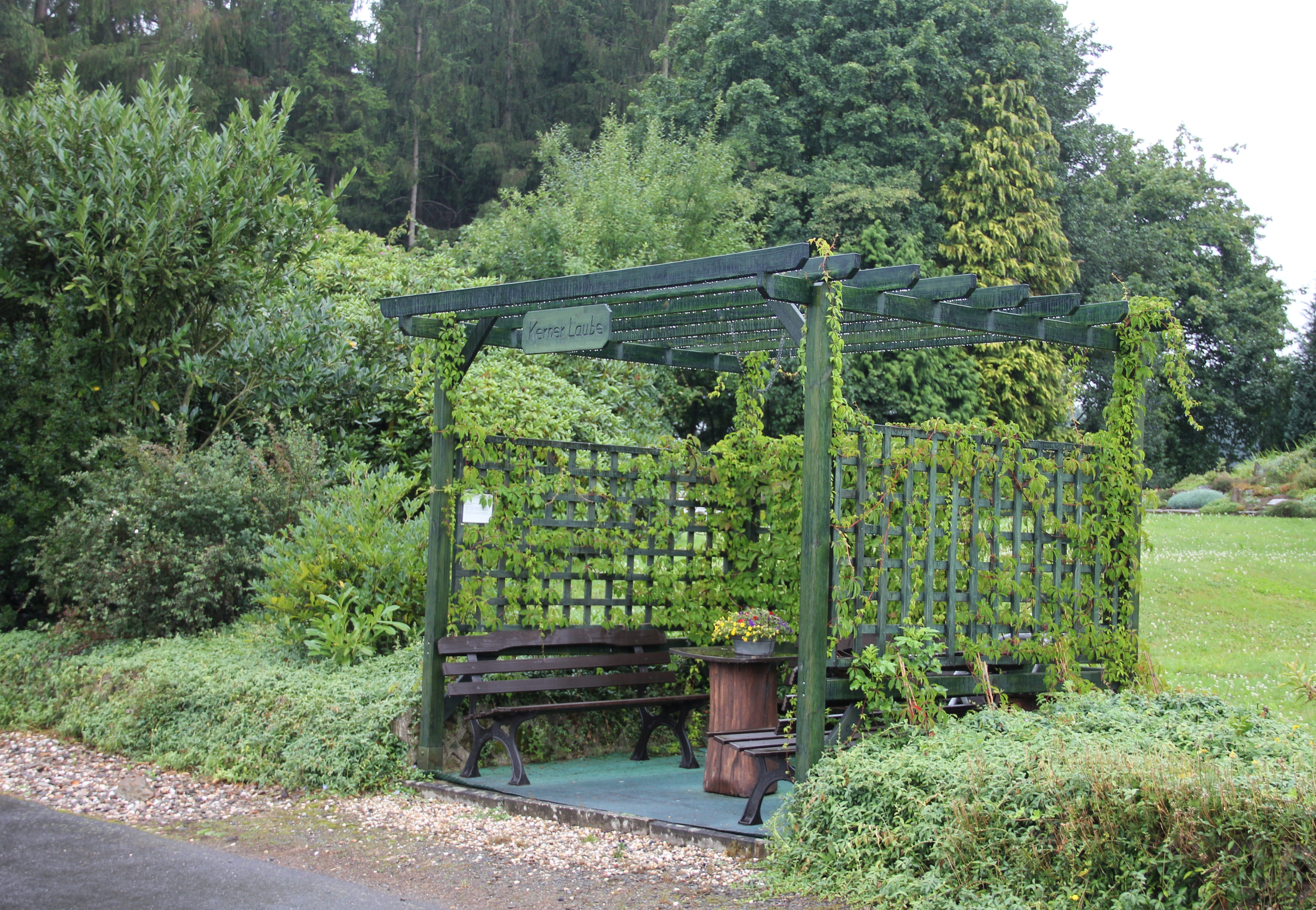 Rastplatz Kerner Laube an den Wanderwegen Kurkölner Weg (X22) des Westerwaldvereins und Winkel 5 des Kölner Eifelvereins in Lohmar - Kern bei einer Regenwanderung.